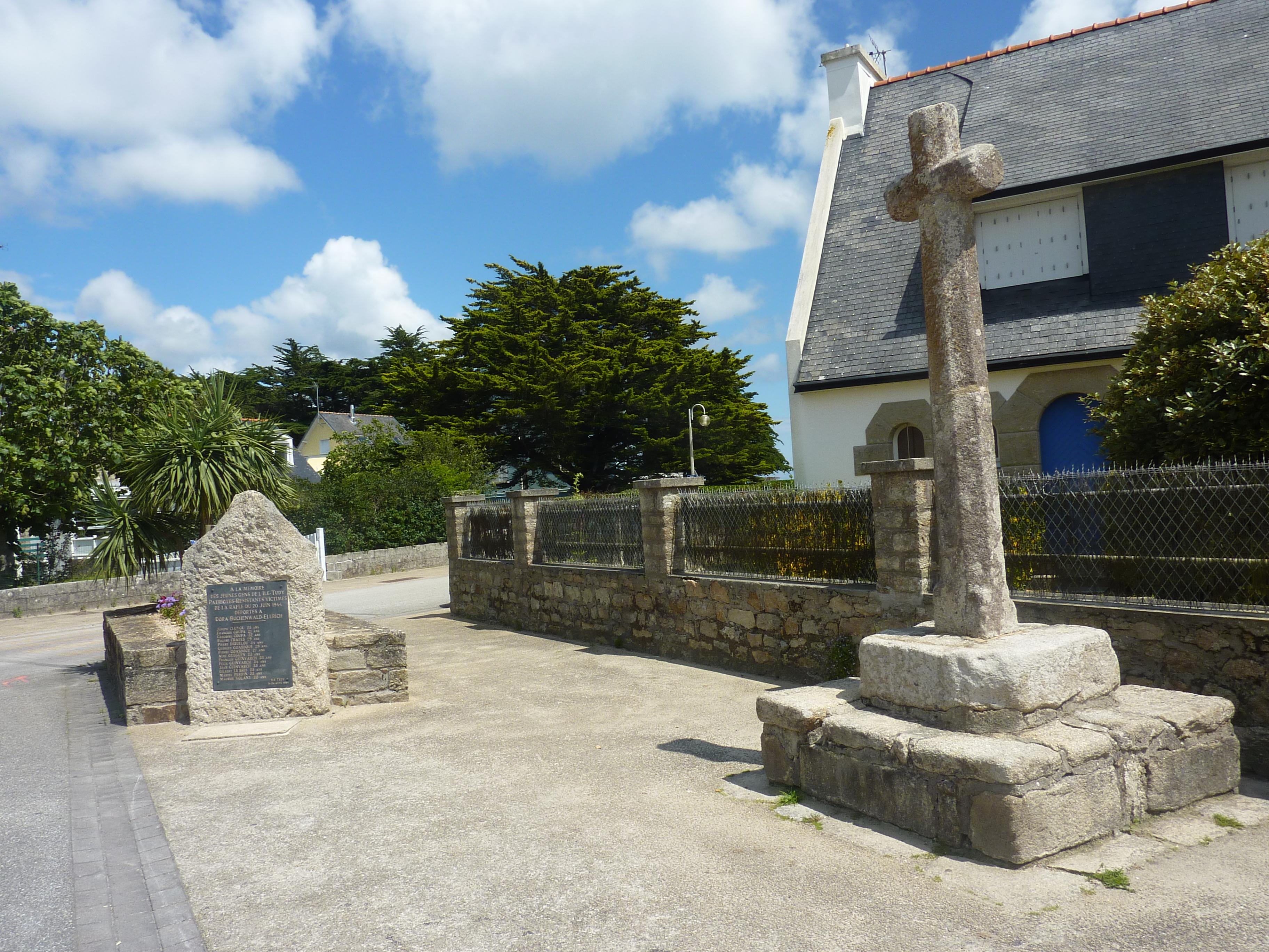 Île-Tudy : monument à la mémoire des jeunes gens de l'Île-Tudy patriotes-résistants victimes de la rafle du 20 juin 1944 déportés à Dora-Buchenwald-Ellrich